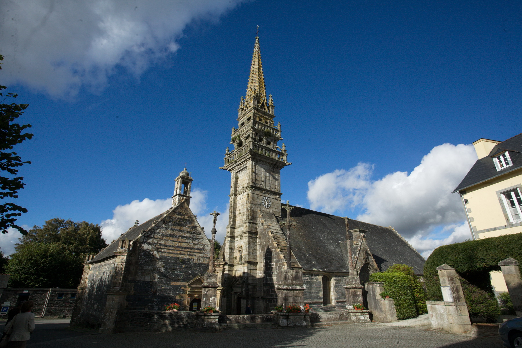 Église Saint-Yves de La Roche-Maurice (Classé) .